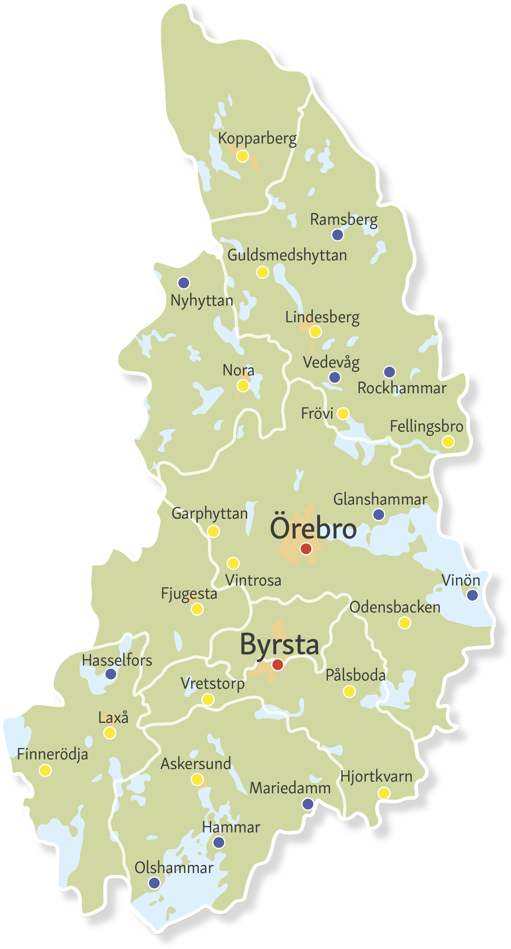 Karta